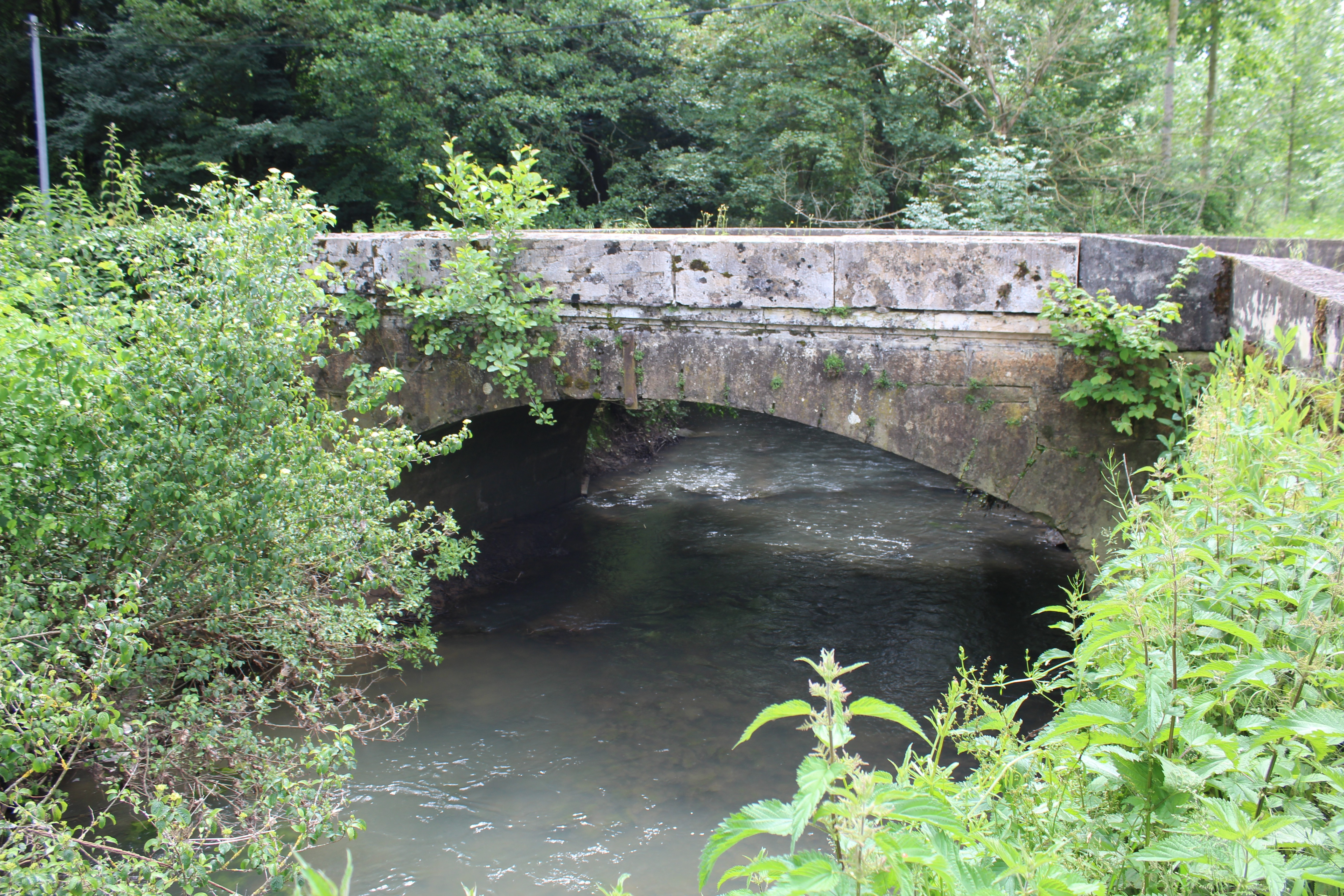 Le Menthon au lieu-dit Les Fasses.